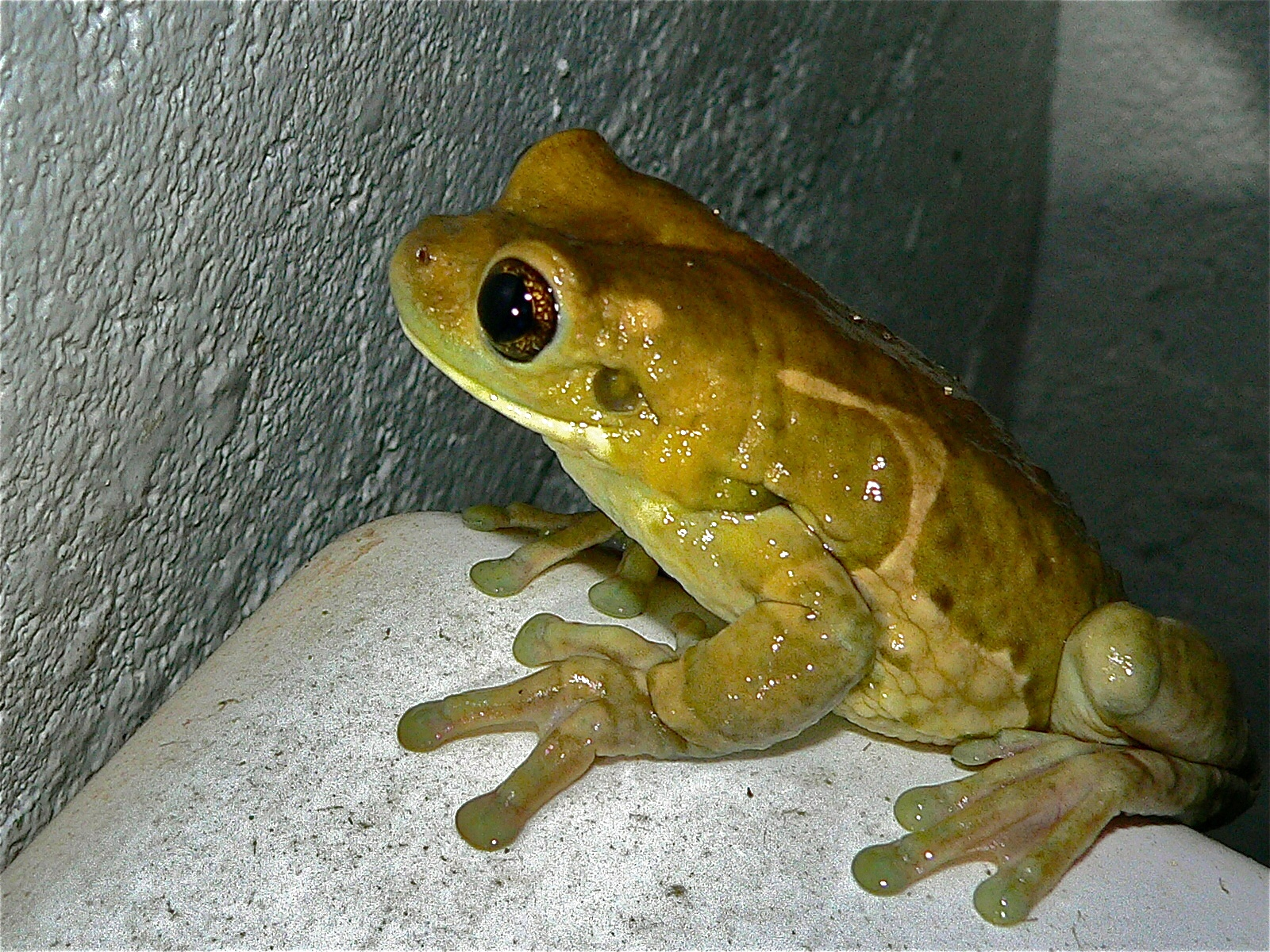 Camp Site, Santa Rosa NP, COSTA RICA